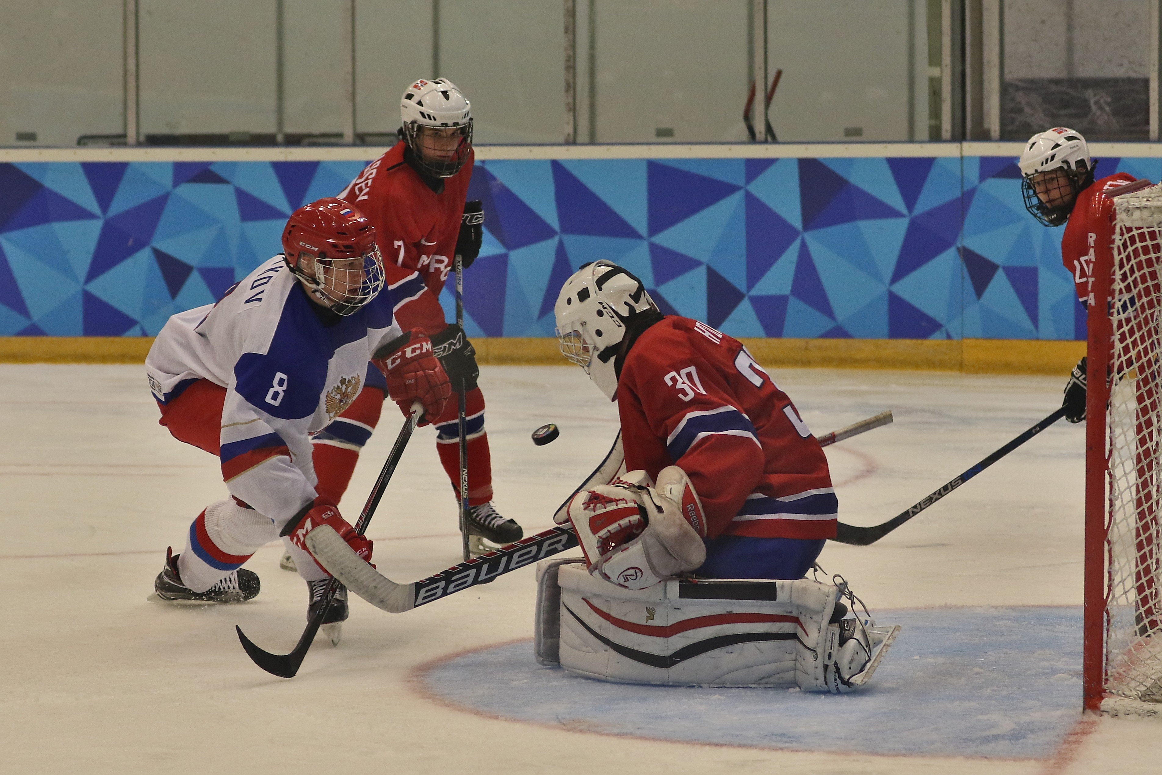 Lillehammer 2016 Hockey Norvège - Russie Russie ː Vladislav Kotkov (8) / Norvège ː Kristoffer Thomassen (7), Mathias Emilio Pettersen (20) et Kristian Hovik (30)